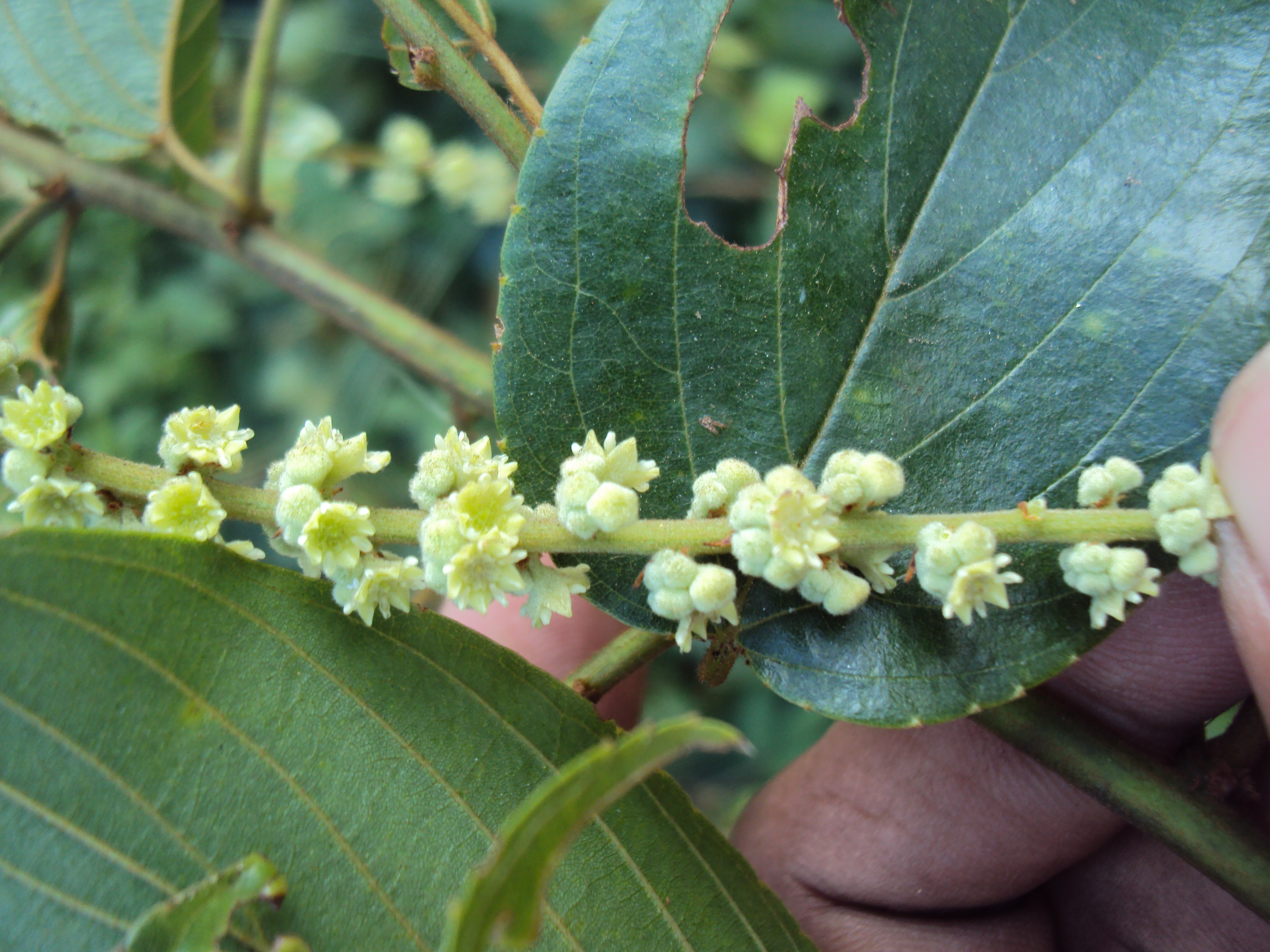 Photos from Periya, Wayanad